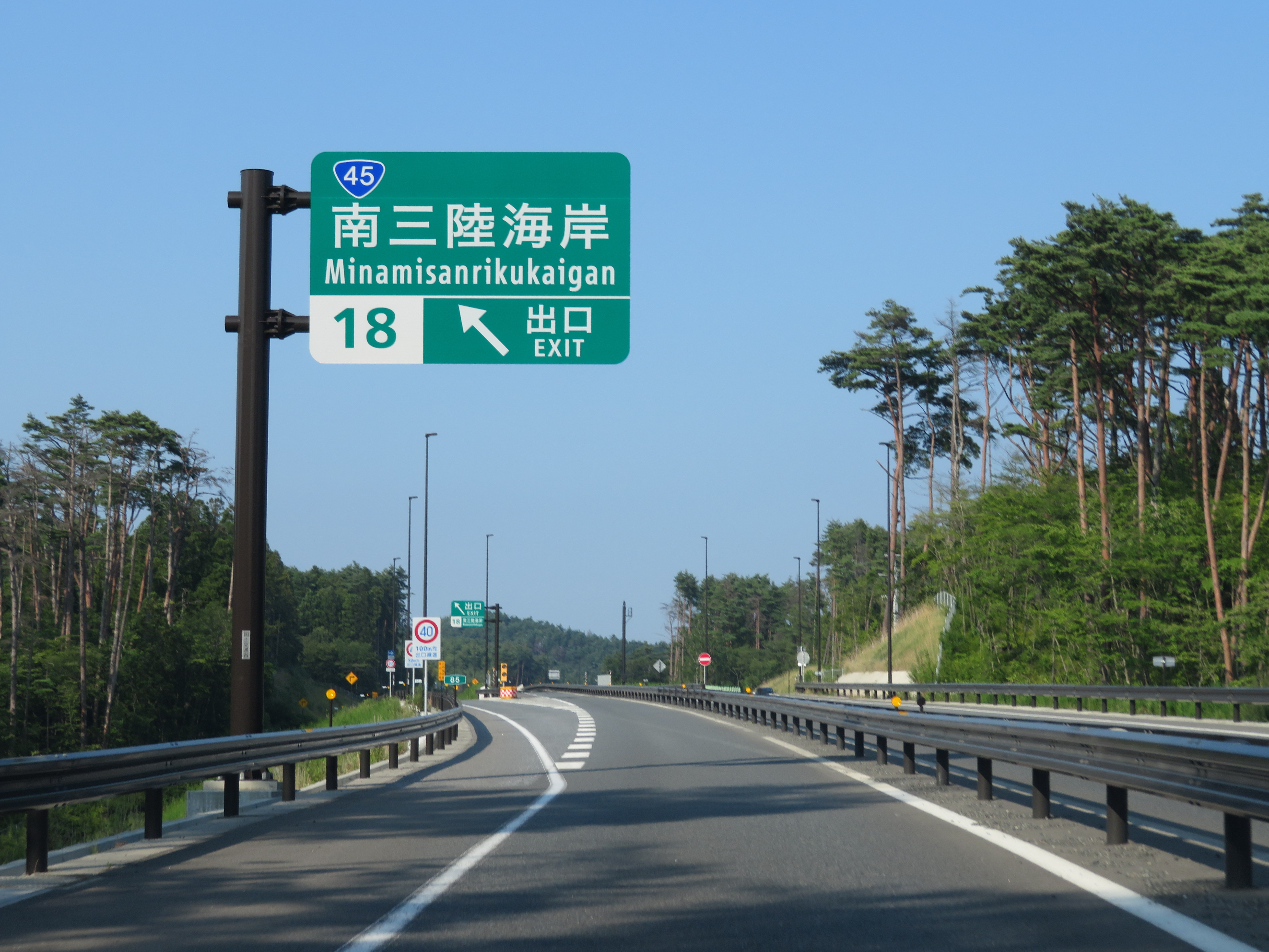 三陸自動車道南三陸海岸IC出口付近（志津川IC方面側から撮影）